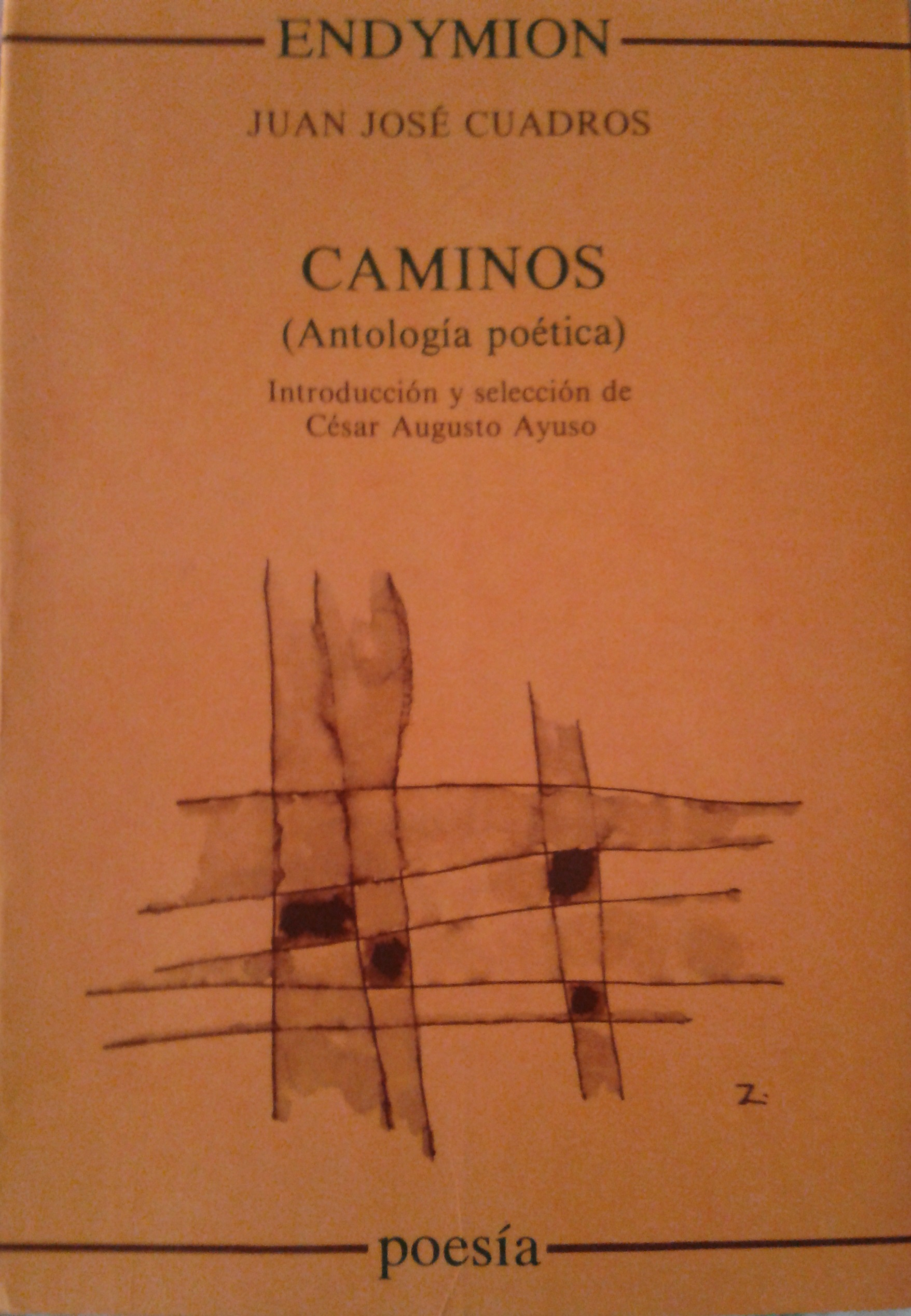 Caminos (Antología poética) de Juan José Cuadros